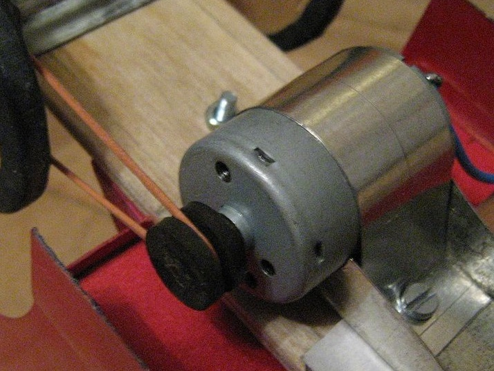 Модельный электродвигатель класса 300 на кордовой модели автомобиля, закреплённый хомутом из жести